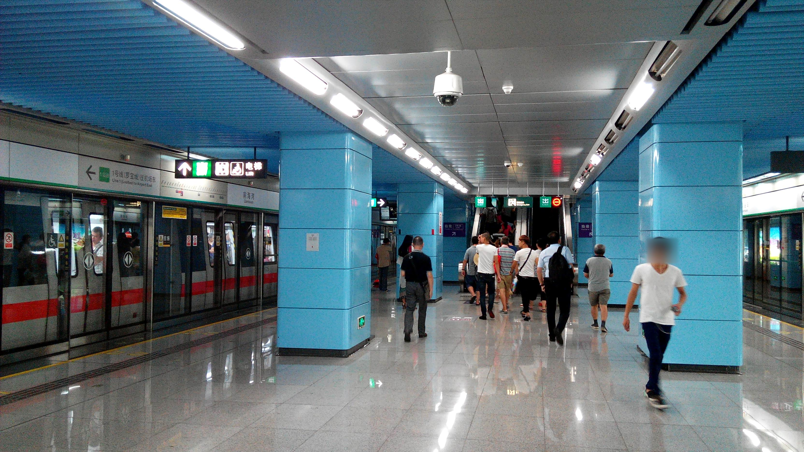 深圳地铁1号线 前海湾站 站台